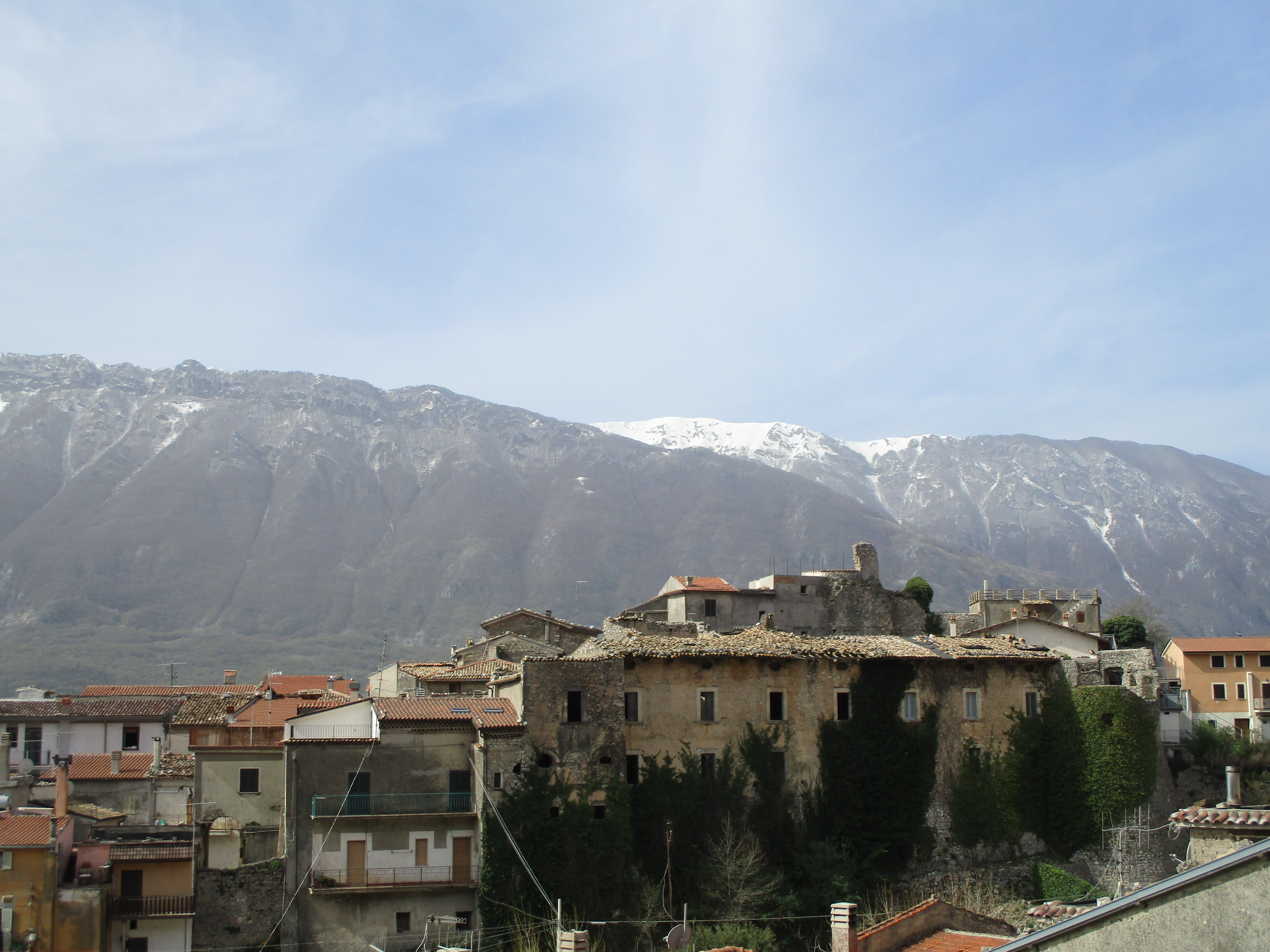 Panoramica di Morrea